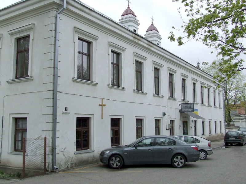 Jonavos trinitorių vienuolynas. Buvusi poliklinika.